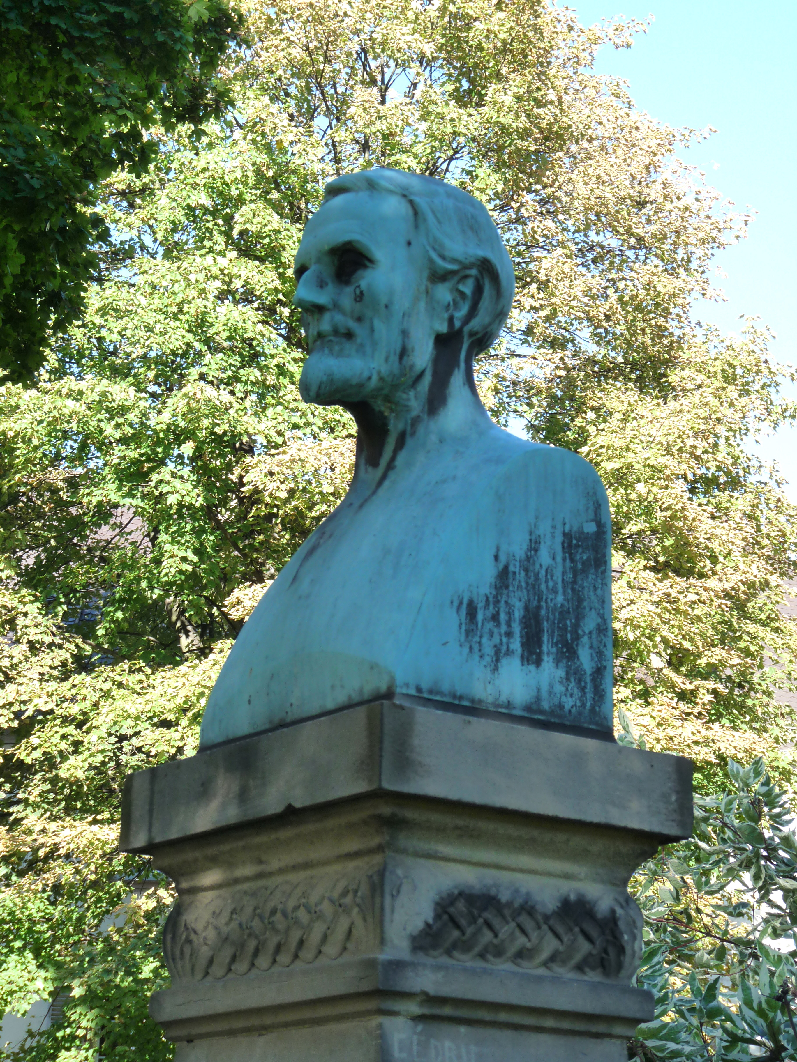 Buste du chirurgien Eugène Boeckel réalisé par Alfred Marzolff. Monument situé dans l'enceinte de l'Hôpital Civil de Strasbourg, derrière l'ancienne pharmacie.